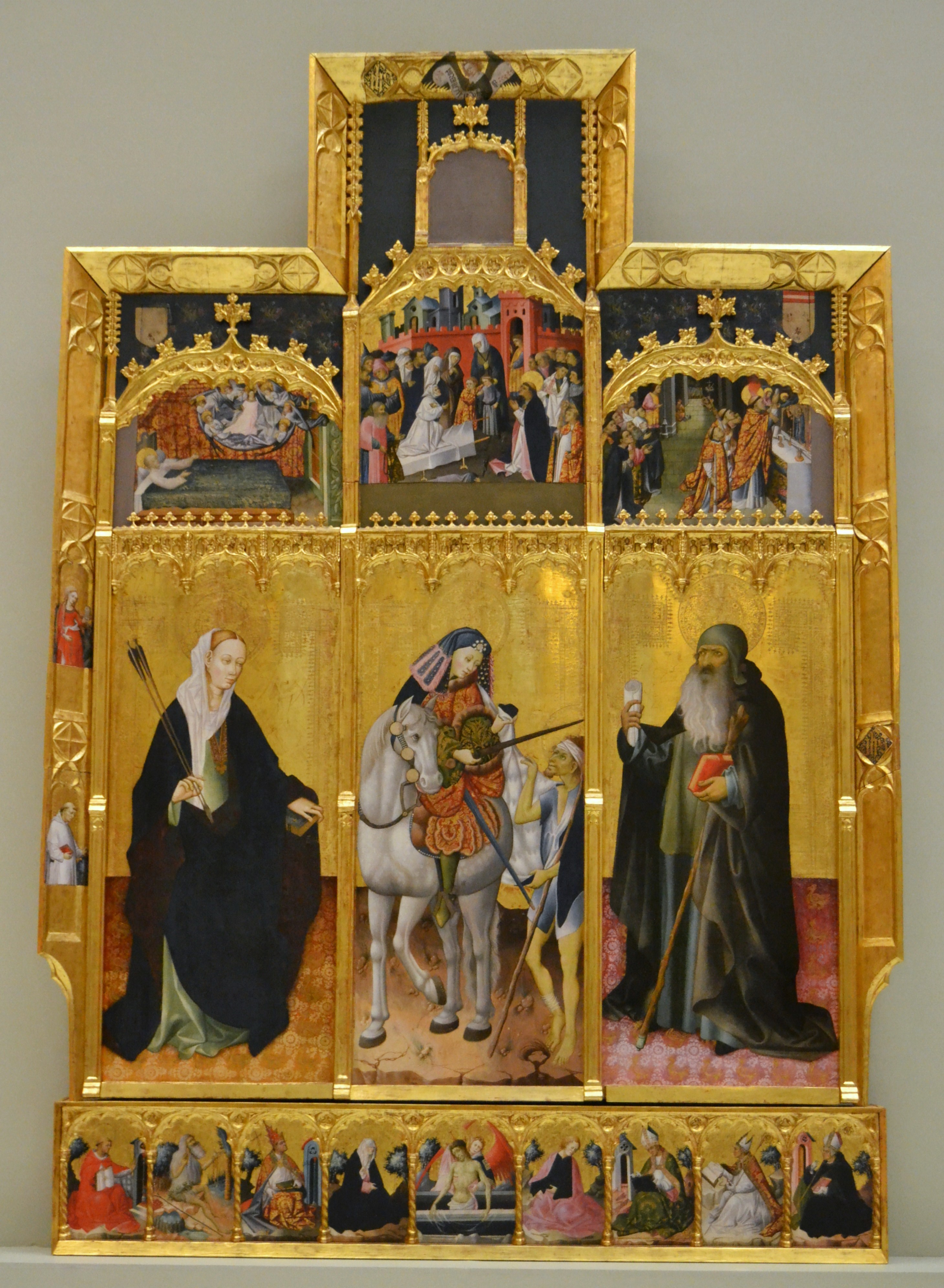 Esta obra, llamada el Retablo de San Martín, Santa Úrsula y San Antonio Abad, procede de la Cartuja de Porta Coeli y debió ser realizada aproximadamente entre 1437 y 1440.